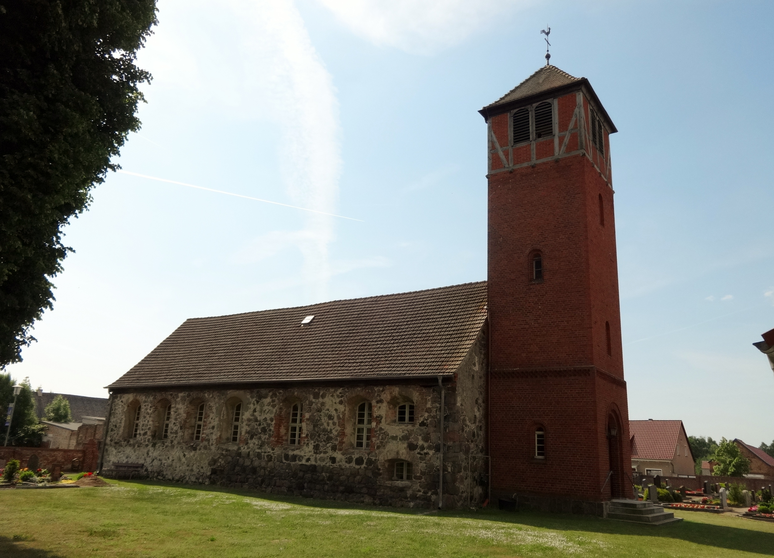 Die Feldsteinkirche wurde 1459 erstmals urkundlich erwähnt. Untersuchungen ergaben jedoch, dass sie auf einen Vorgängerbau aus dem 13. Jahrhundert errichtet wurde. Im Innern befinden sich ein Kanzelaltar aus dem Jahr 1726 sowie eine Süd- und Ostempore aus dem 18. Jahrhundert.